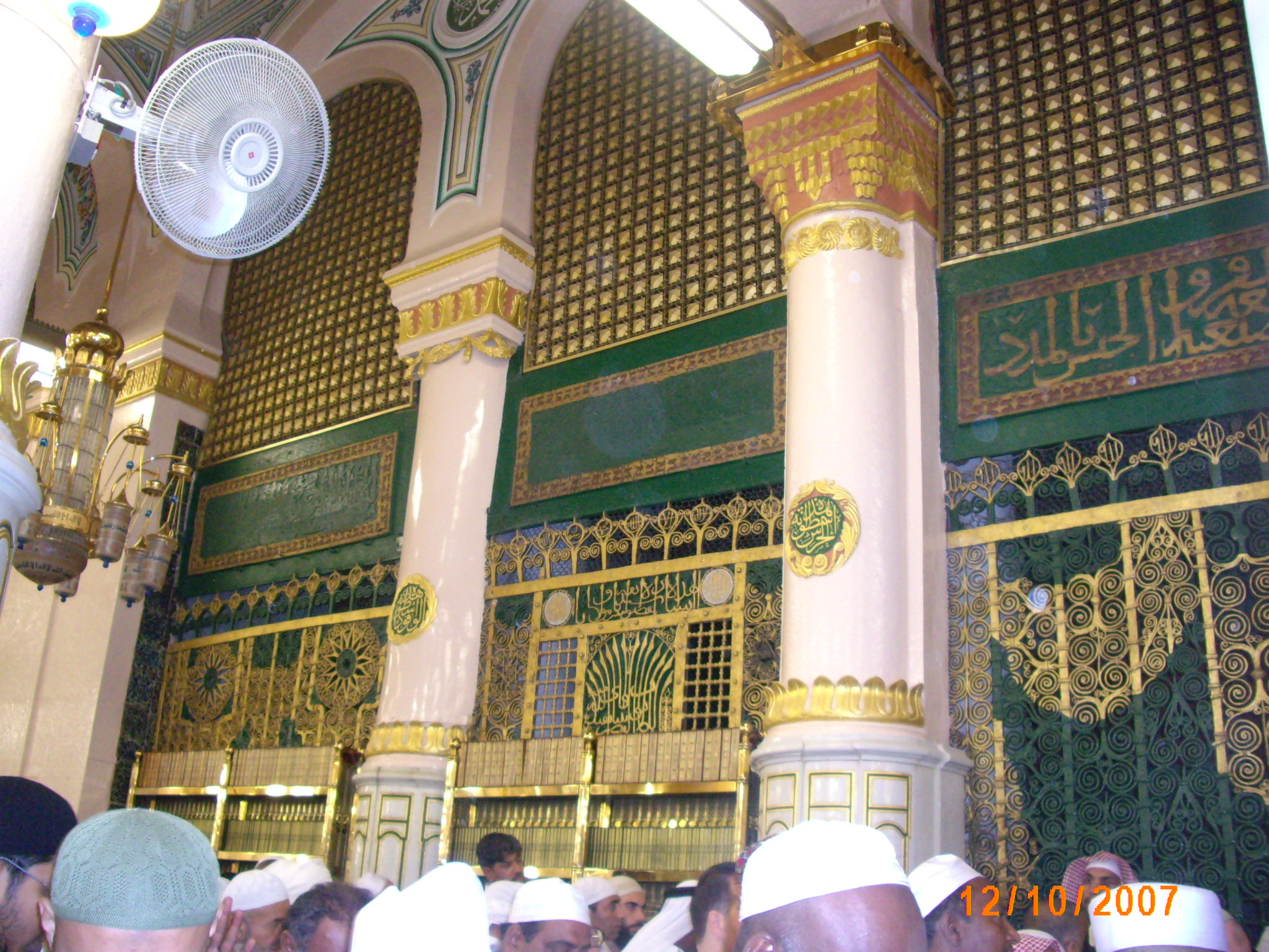 ഈ കെട്ടിടത്തിനുള്ളിലാണ് മുഹമ്മദ് നബിയുടെ ഖബർ ഉള്ളത്.